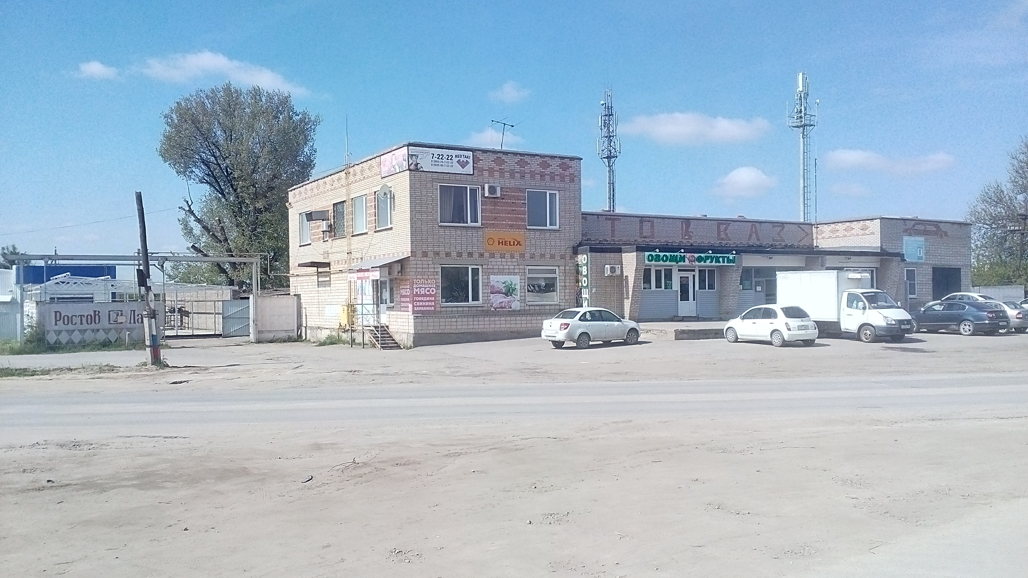 Станция технического обслуживания в Старой Станице, Каменский район.